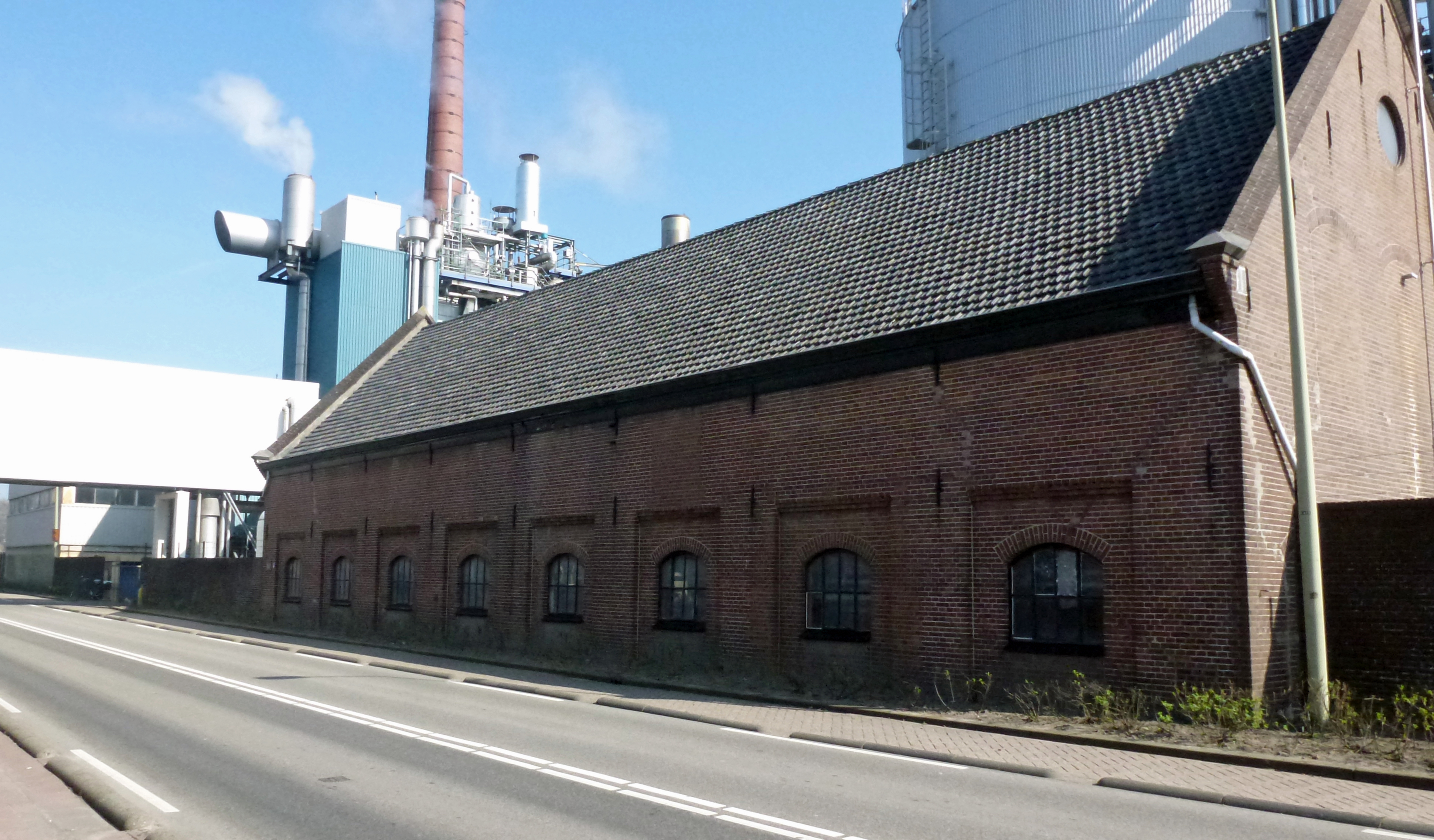 Scheepsbouwloods uit 1900-1916 van Scheepswerf Het Kromhout. In 1916 werd het overgenomen door de voormalige Goudse NV Stearine Kaarsenfabriek en ingebruik genomen voor de waterbehandeling van de fabrieksproducten